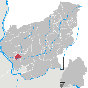 Binzen, Landkreis Lörrach, Baden-Württemberg